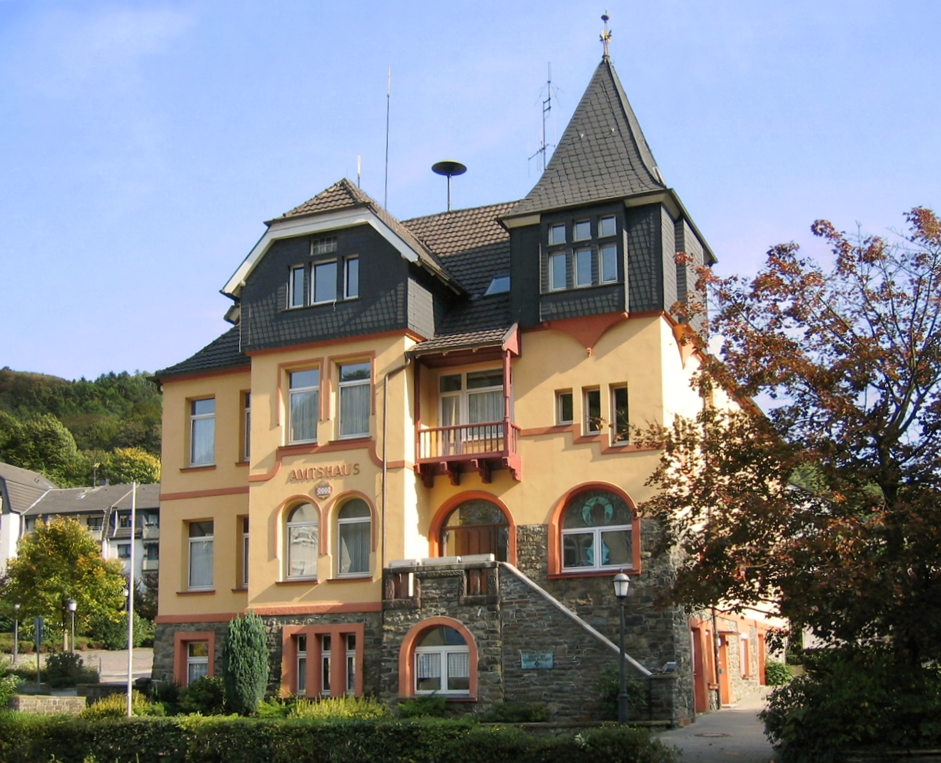 Altes Amtshaus in Nachrodt-Wiblingwerde, Hagener Straße 76. This image shows a heritage building in Germany, located in the North Rhine-Westphalian city Nachrodt-Wiblingwerde (no. 8).